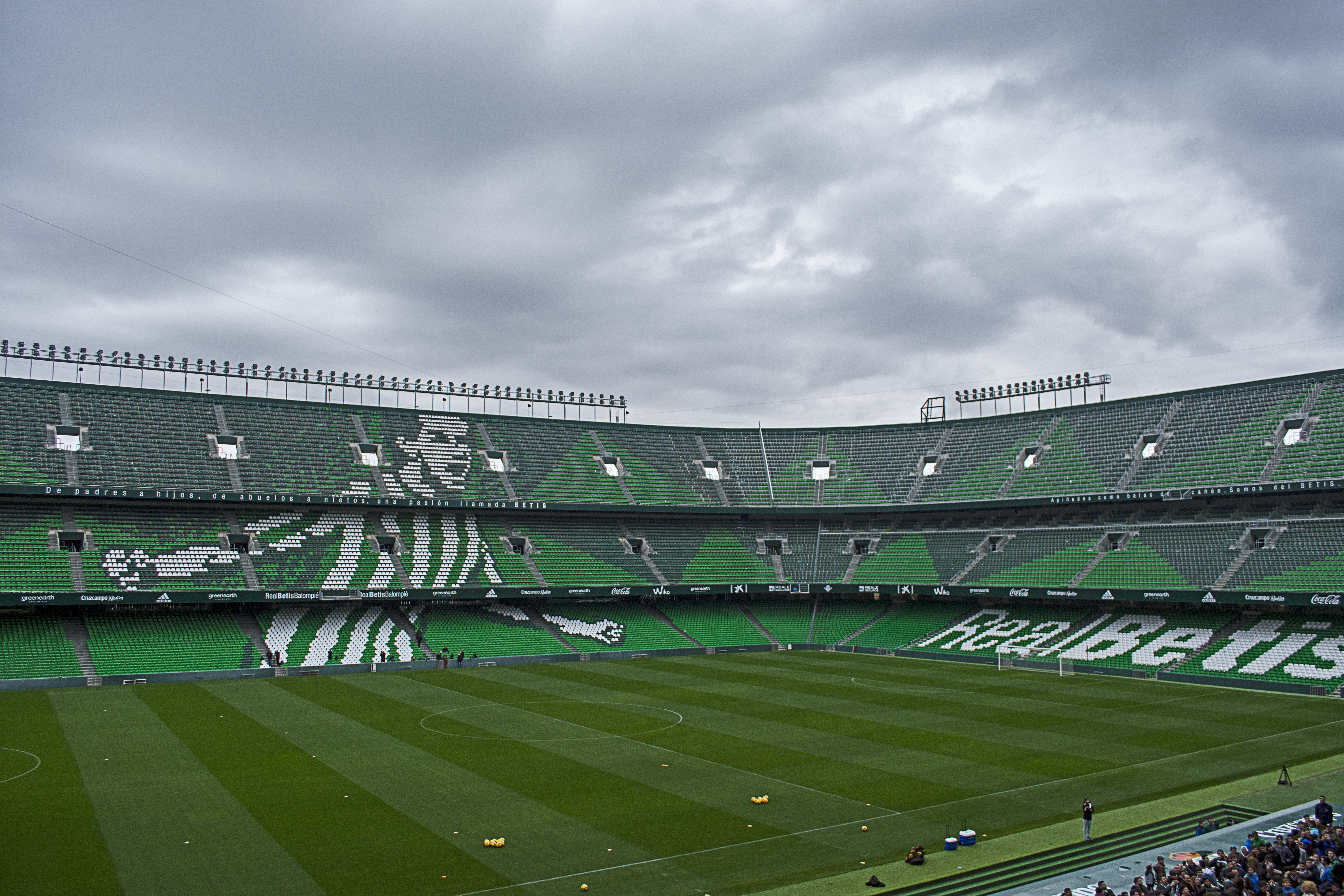 Estadio Benito Villamarín